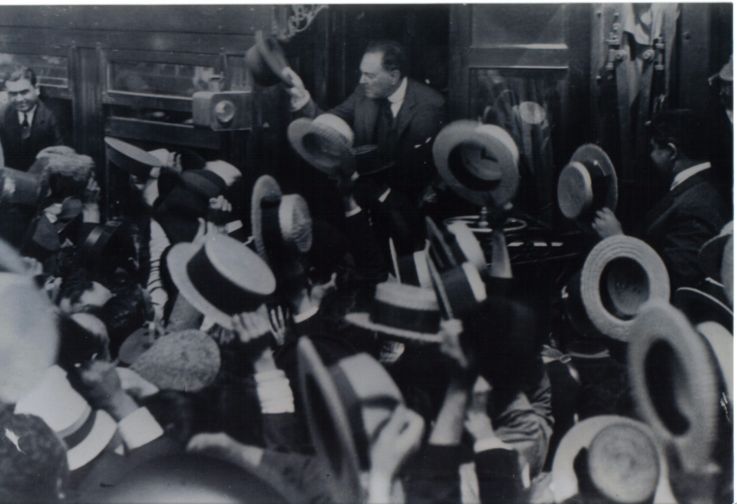 Yrigoyen hace un alto en la estación del ferrocarril en la ciudad de Rosario, de camino hacia Santa Fe en la campaña electoral de 1926.